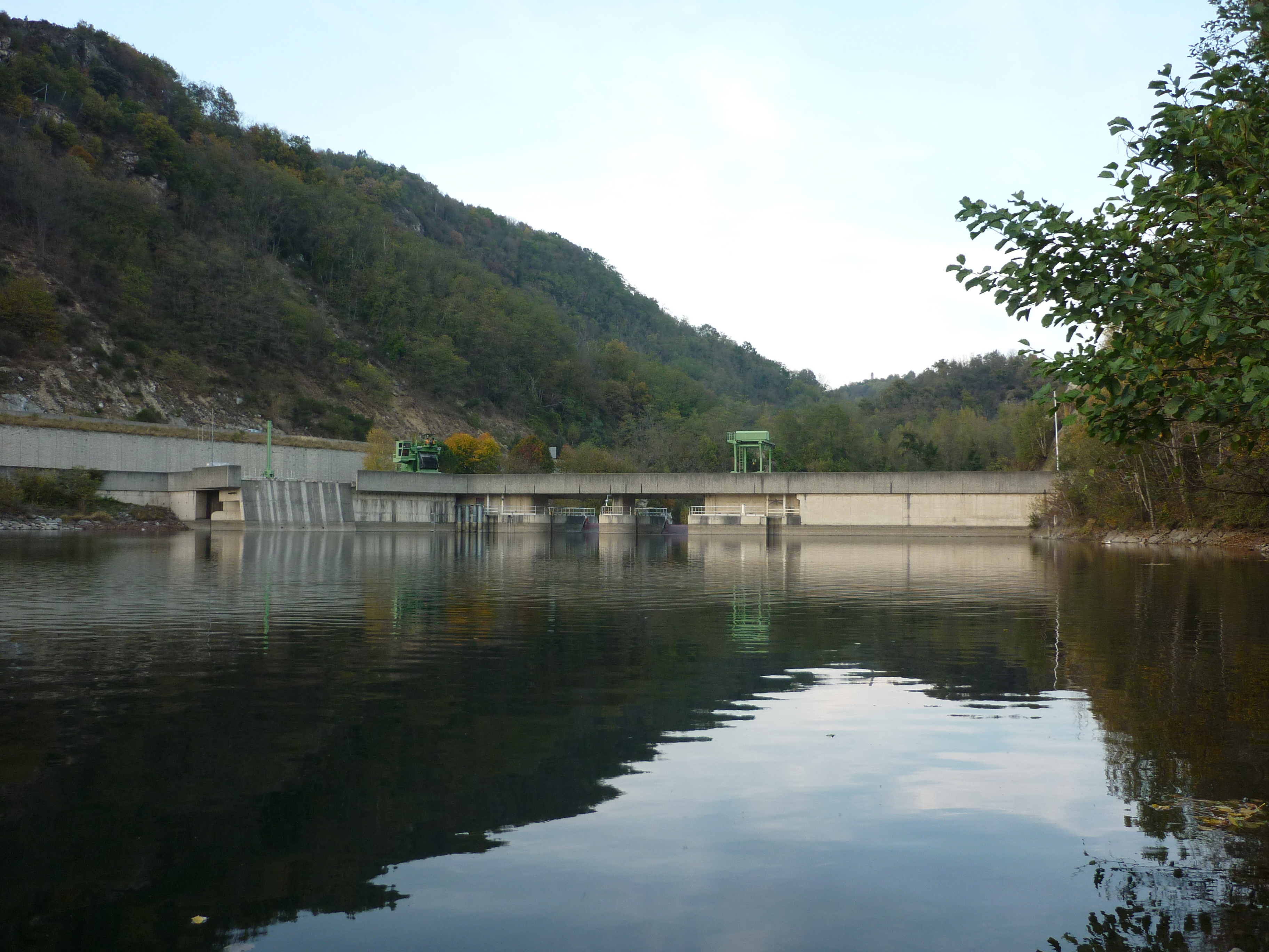 Barrage de Mercus-Garrabet à Garrabet, département de l'Ariège, sur la rivière Ariège, vue amont depuis le lac de Mercus